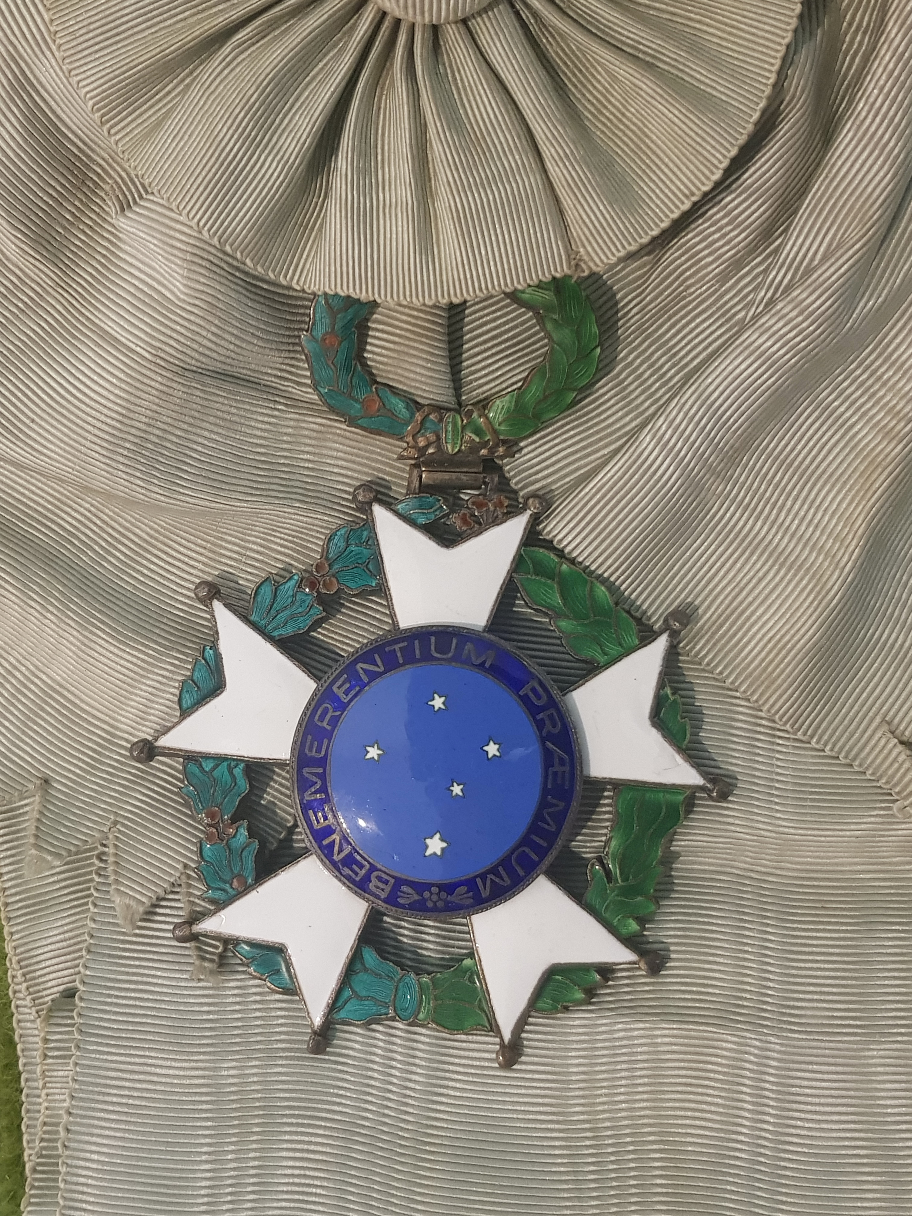 Großkreuz des brasilianischen Verdienstordens „Nationaler Orden vom Kreuz des Südens” (Ordem Nacional do Cruzeiro do Sul) in der 2. Klasse, genannt Grã-Cruz. Zusätzlich zum gezeigten Abzeichen am Band wird in dieser Kategorie ein Bruststern verliehen. Gestiftet ist der Orden speziell für Ausländer.